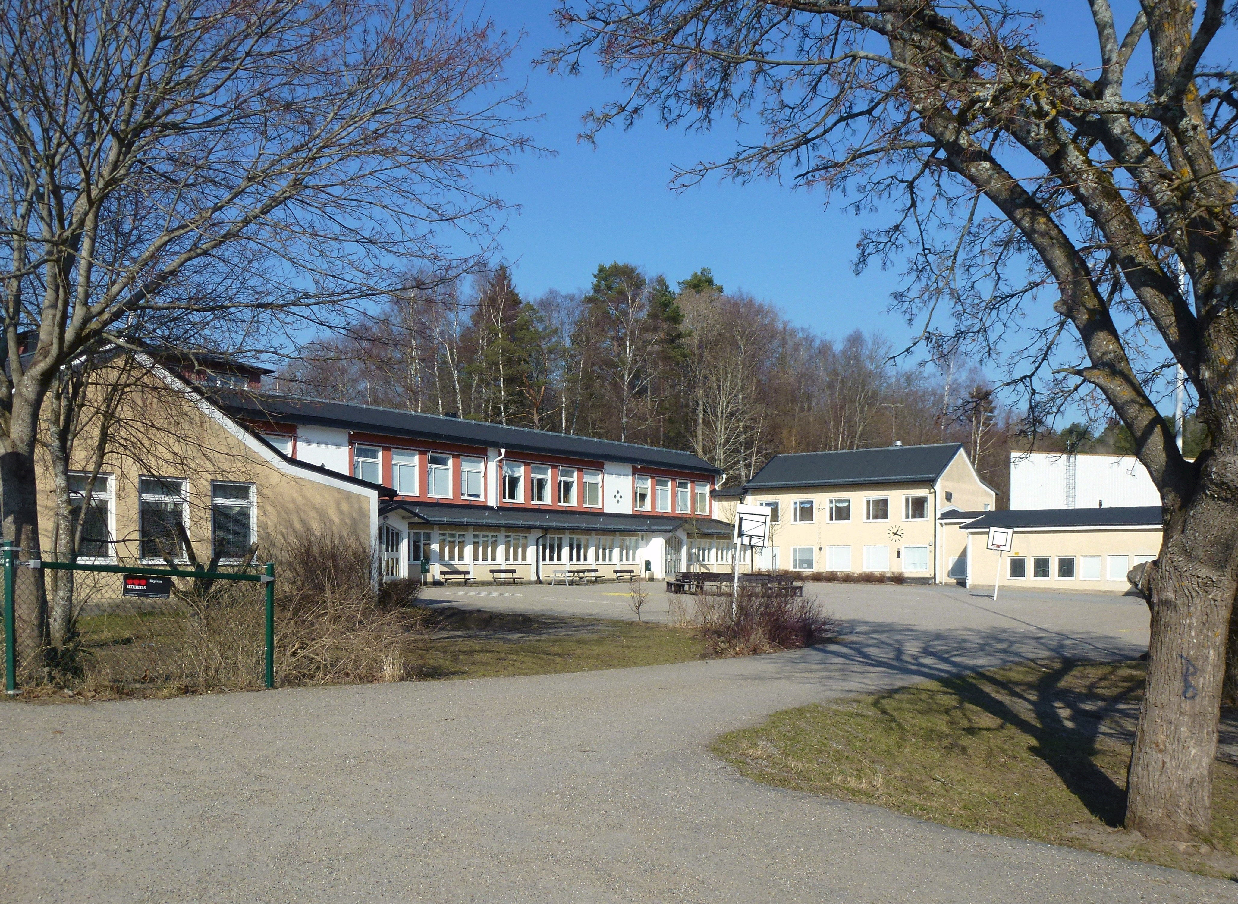 Vika skola, arkitekt Karl W. Ottesen